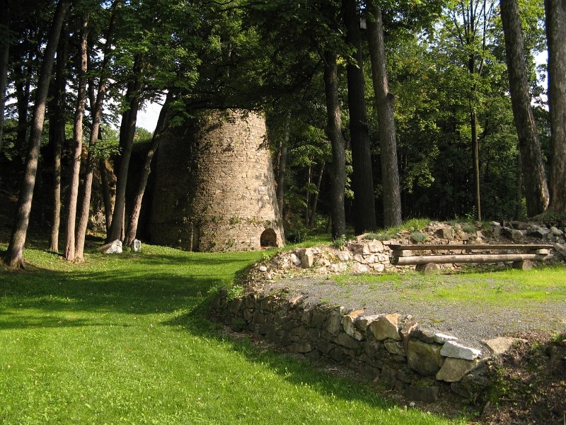 Vápenka, západní konec obce za čp. 64, okraj vápencového lomu